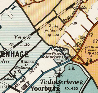 Zijdepolder